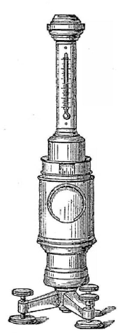 Skalenphotometer